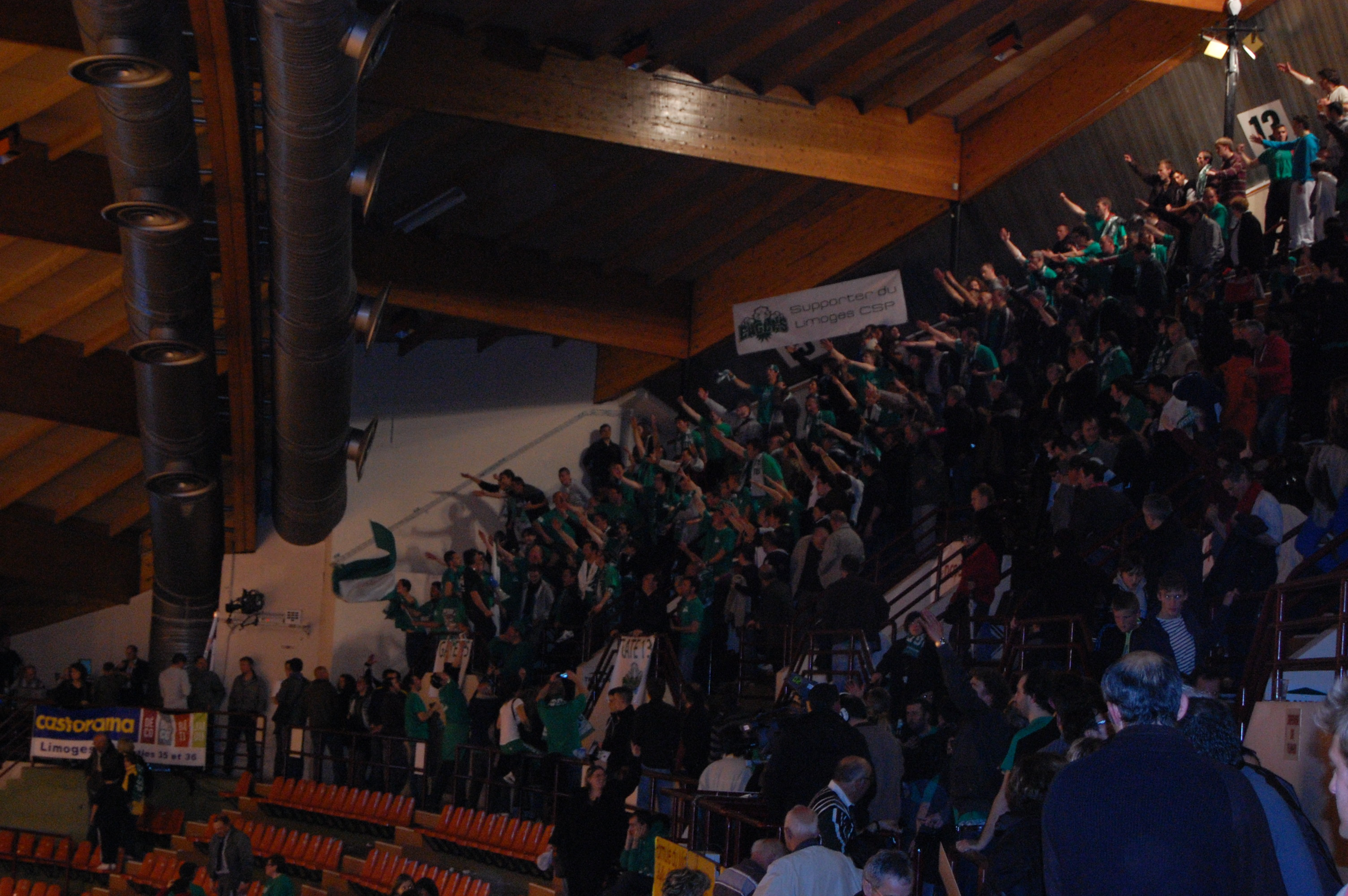 le carré des Eagles à Beaublanc à l'issue du match de quart de finale de coupe de France (gagné par le cSp) contre Le Mans. Les spectateurs sont partis, pas les Eagles